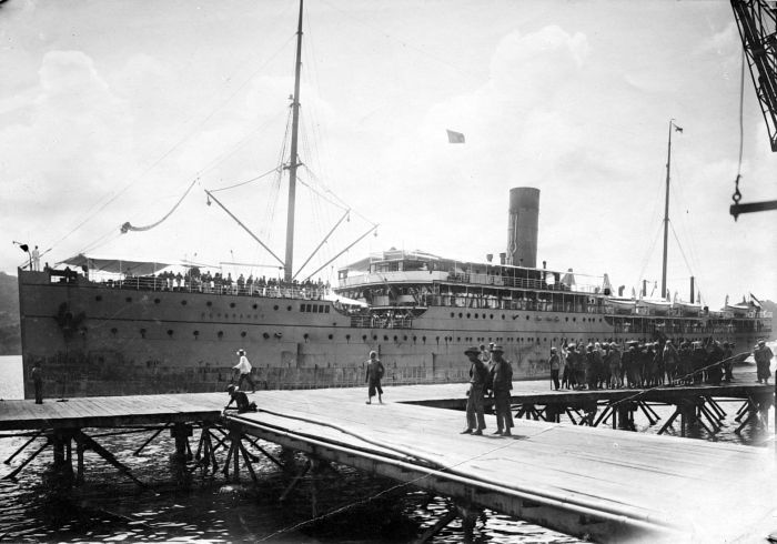 Repronegatief. Aankomst op de eerste reis van het S.S. Rembrandt te Sabang op het eiland We, ten noorden van Sumatra Ship Type: Passenger ship Design by: Order date: Built by: Nederlandsche Scheepsbouw Mij., Amsterdam. Yard No: Keel laid: Launch date: Date of completion: Length over all: 132,30 m LPP: 128,30 m Beam: 14,60 m Draught: 9,07 m BRT: 5876 DWT: 6085 NET: 3670 Main engine: Steam 4600 hp Speed: 14 kn Passengers: I 90, II 55, III 20. Crew: History 1906 Named: REMBRANDT for Stoomvaart Mij. Nederland, Amsterdam Flag: Netherlands 1928 Scrapped